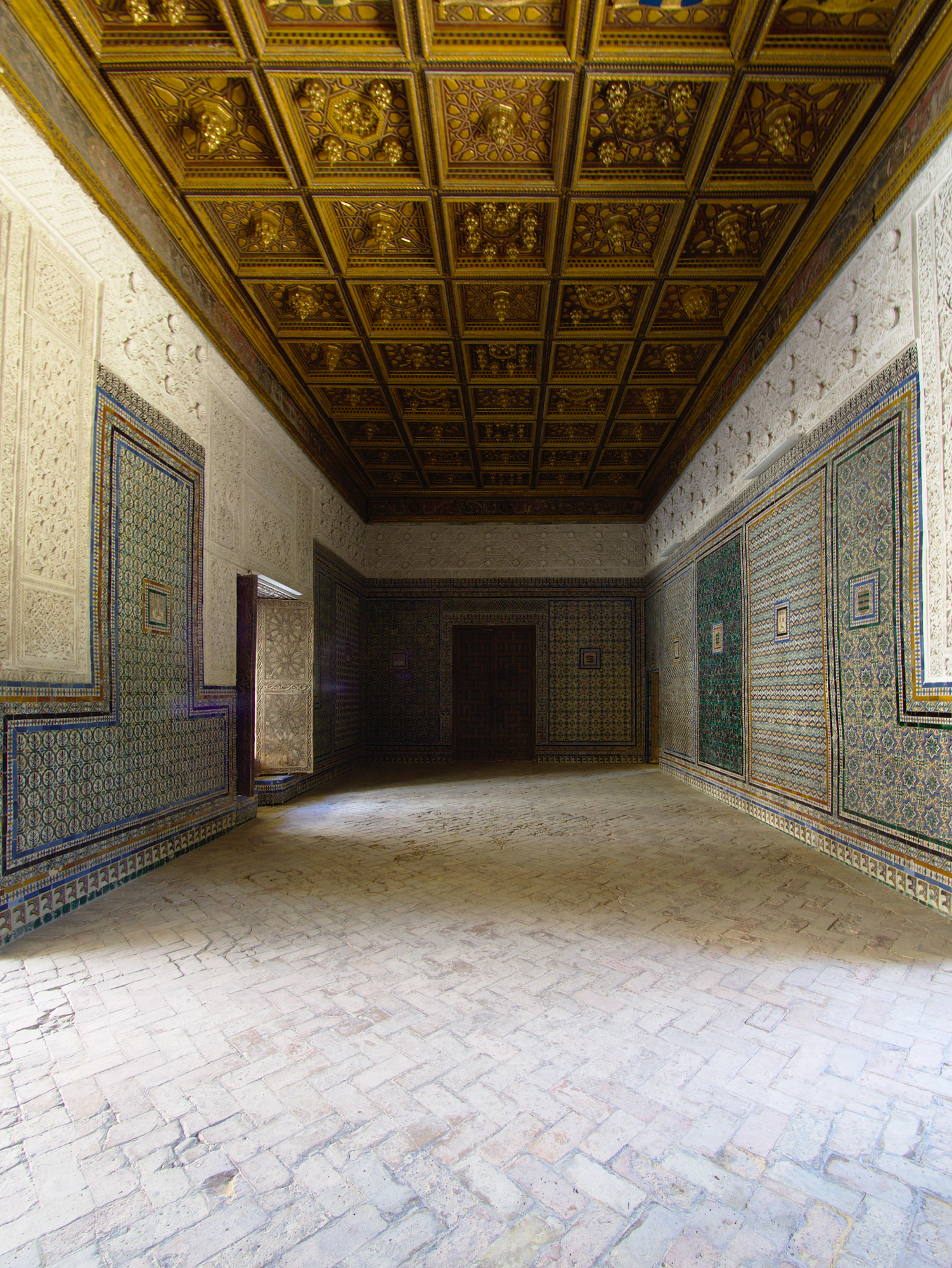 Casa de Pilates.